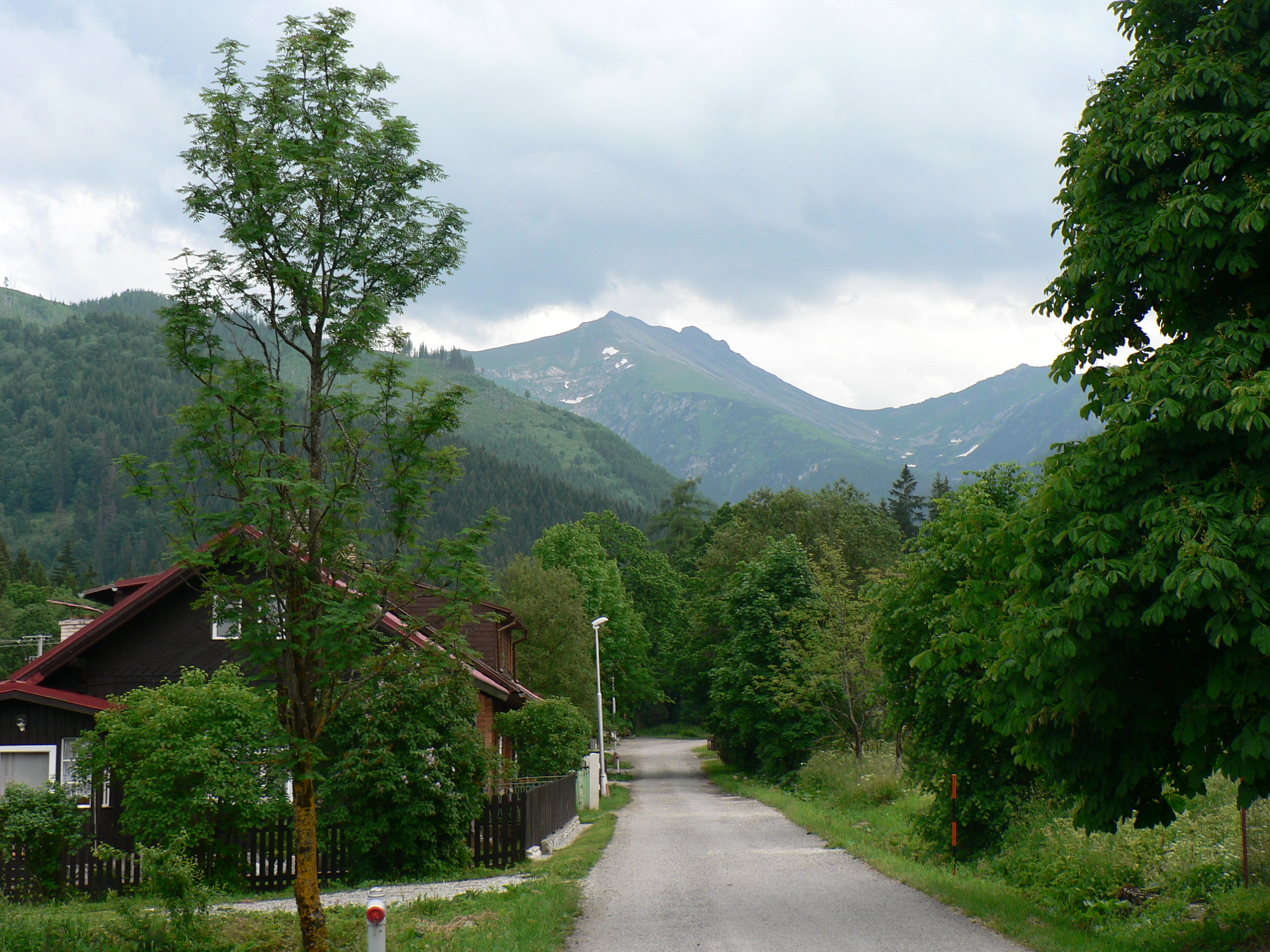 Szeroka Jaworzyńska i Spismichałowa Czuba z Jaworzyny Spiskiej